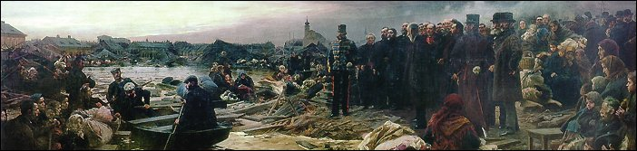 Hungarian: Vágó Pál: Szegedi nagy árvíz